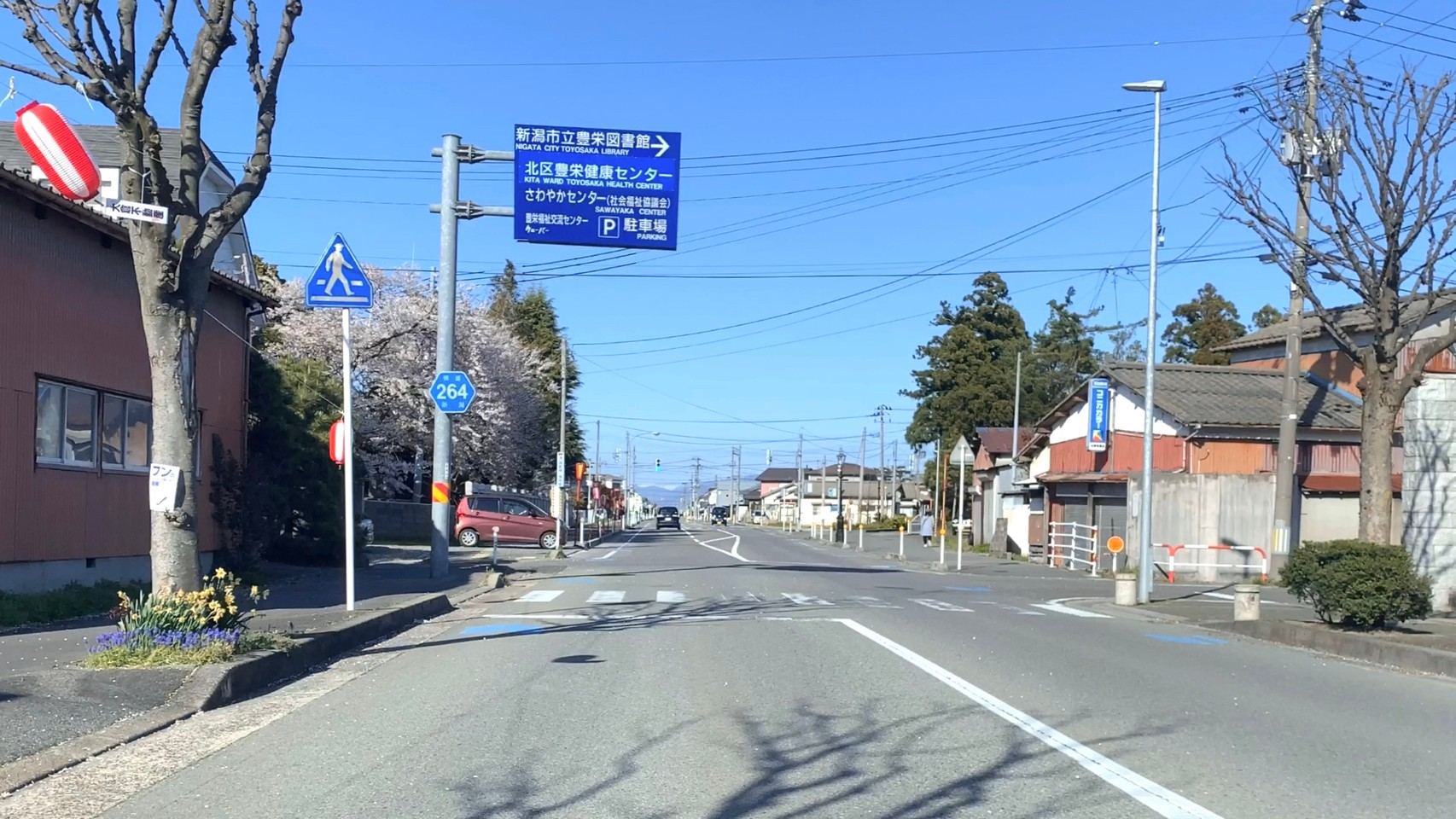 新潟県道264号豊栄天王線 起点付近（新潟市北区，2020年4月）